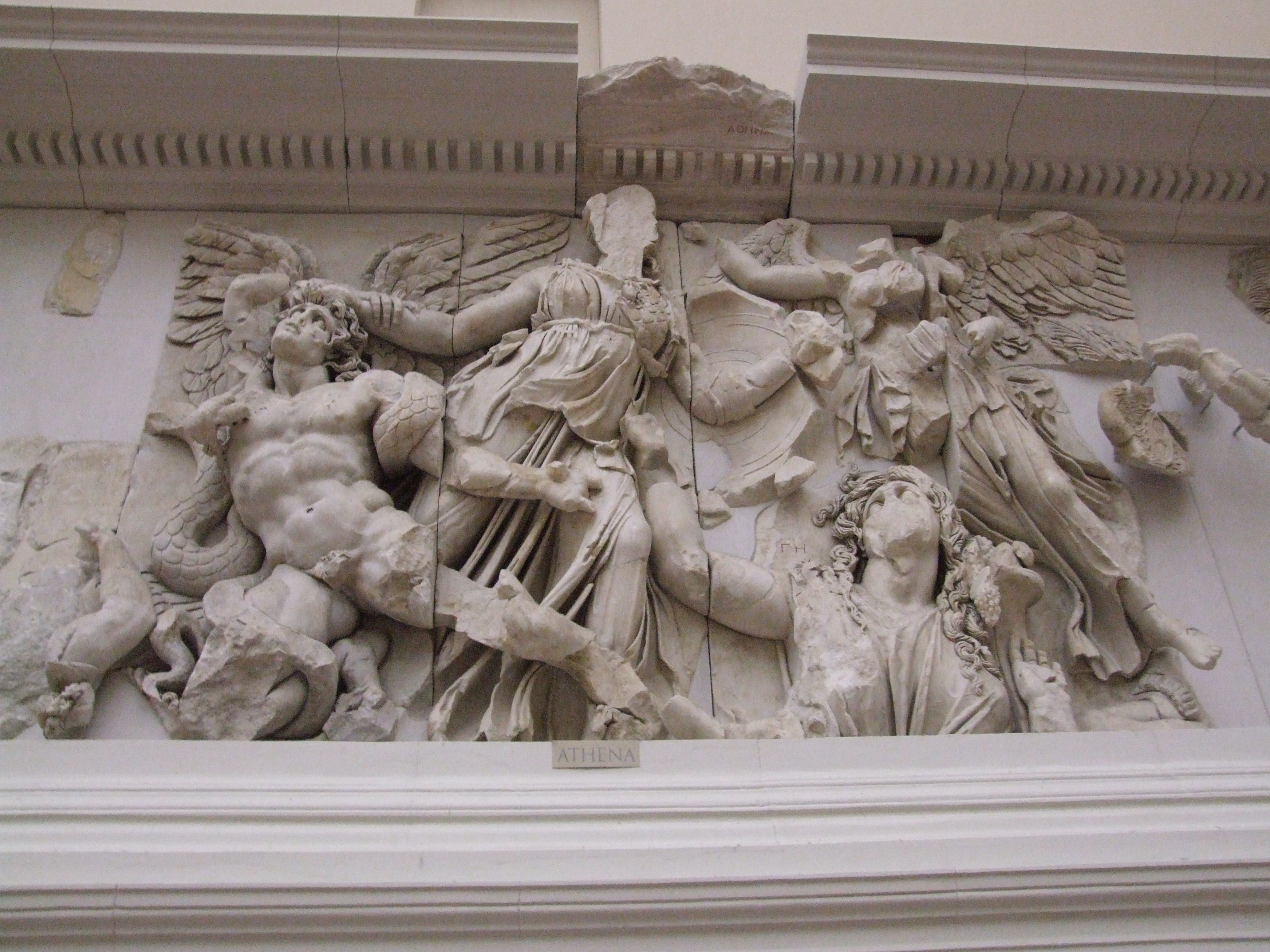 Pergamonmuseum Berlin, Pergamonaltar, Gigantomachie, Athena contra Alkyoneus; Nike (rechts oben, Siegesgöttin), Gaia (unten, Erdgöttin und Mutter der Giganten)